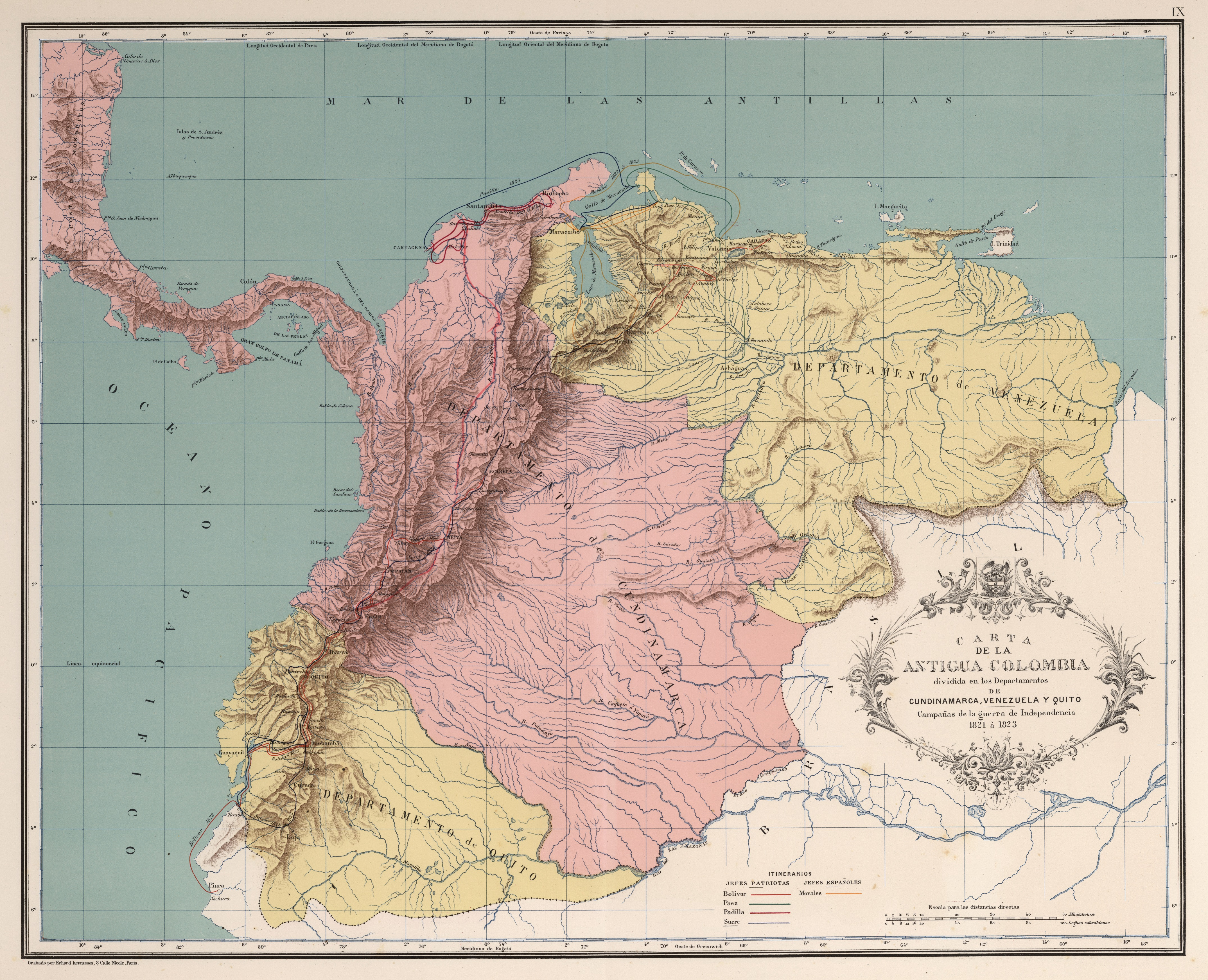 Carta de la Antigua Colombia dividida en los departamentos de Cundinamarca, Venezuela y Quito. Campañas de la guerra de independencia años 1821 a 1823. Carta IX del Atlas geográfico e histórico de la República de Colombia, 1890.